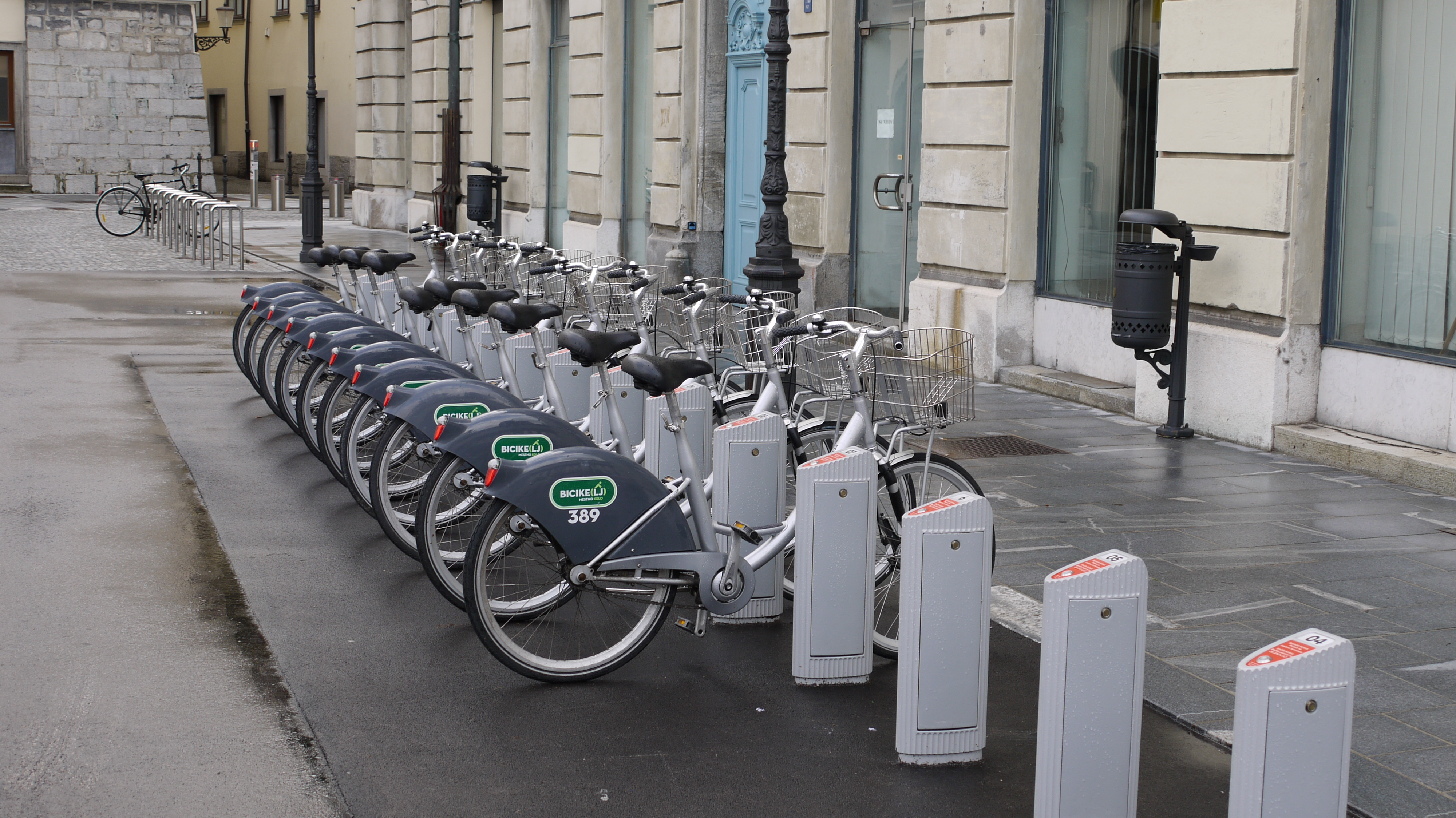 Ljubljana old town - city bikes